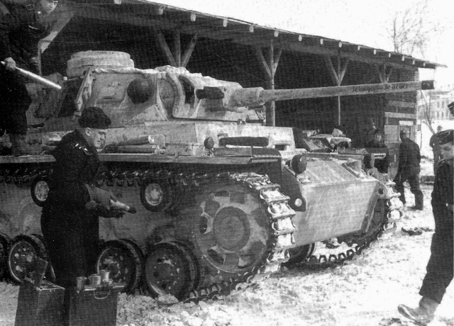 L'equipaggio di un Panzer III si prepara ad entrare in azione durante la campagna d'inverno del 1942-1943 sul fronte orientale